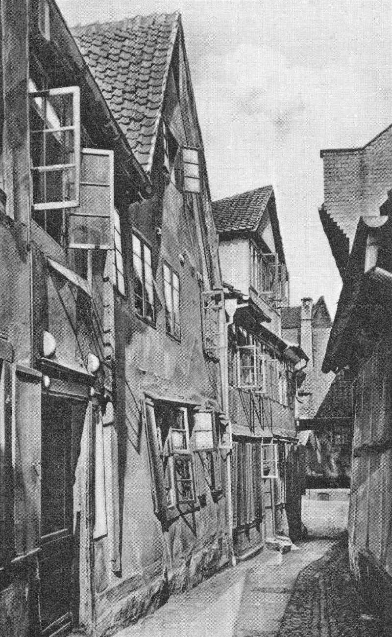 Durchgang von der Aegidienstraße in den Ottilienteil in Braunschweig.